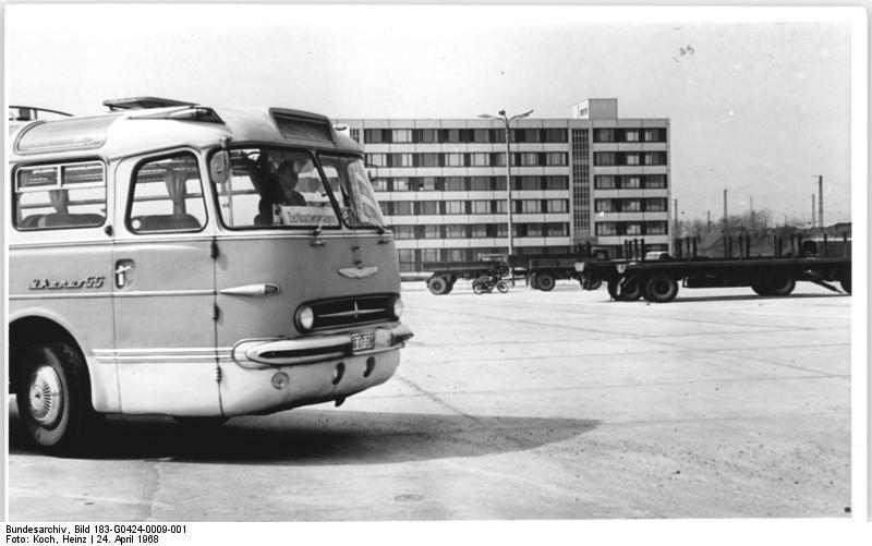 Leipzig, Autohof Zentralbild Koch 24.4.1968 Leipzig: Einen neuen Autohof konnte dieser Tage der VEB Kraftverkehr Leipzig, der größte Betrieb seiner Art in der DDR beziehen. Dieser Autohof bietet Platz für 830 Motorwagen und Hänger, zu ihm gehören neben der Pflegehalle eine Reparaturhalle, eine Tankanlage und ein fünfstöckiges Sozialgebäude.